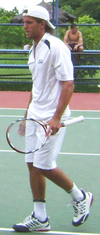 Tenista argentino Juan Pablo Brzezicki, no Aberto de São Paulo de Tênis.